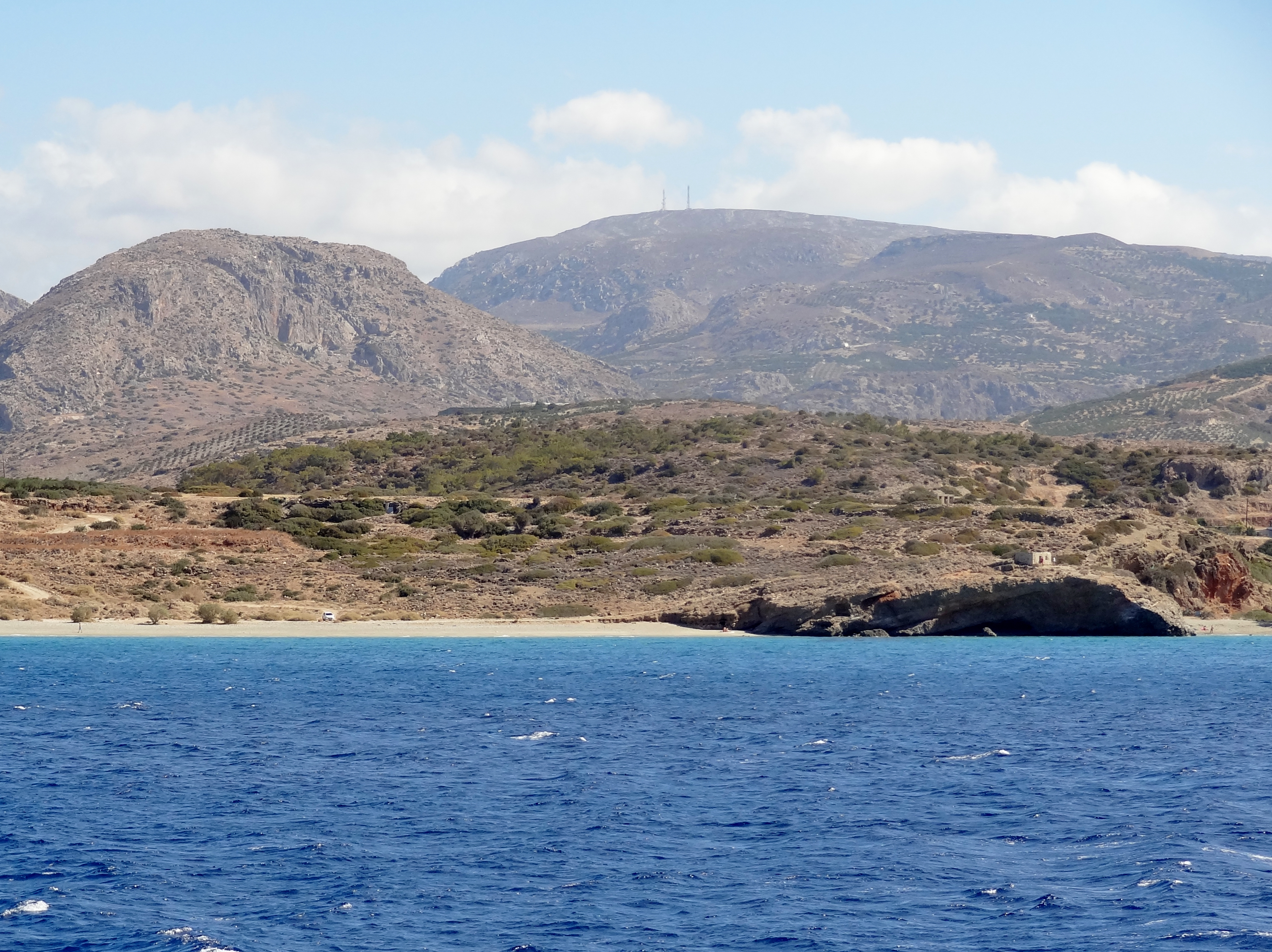 Strand von Diaskari (Παραλία Διασκάρι), Gemeinde Sitia, Kreta, Griechenland